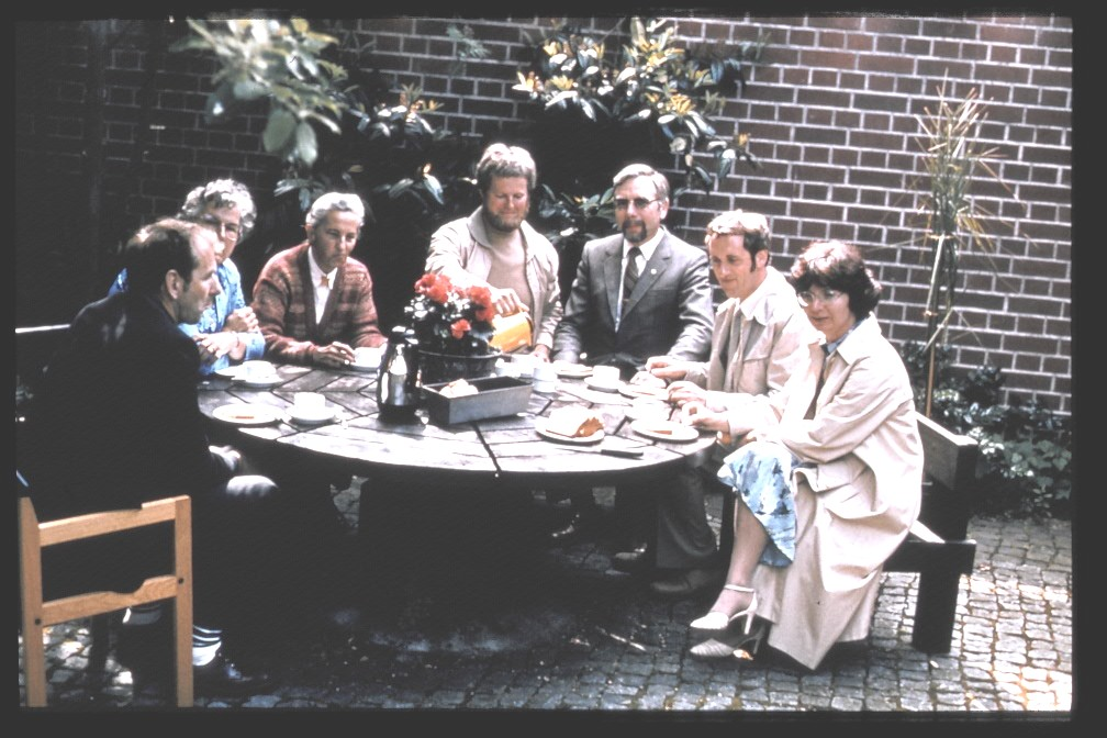 Propra bildo, el la arkivo de Josef Schiffer GNU - La aŭtoro rezignas pri sia kopirajto laŭ GNU-licenco.